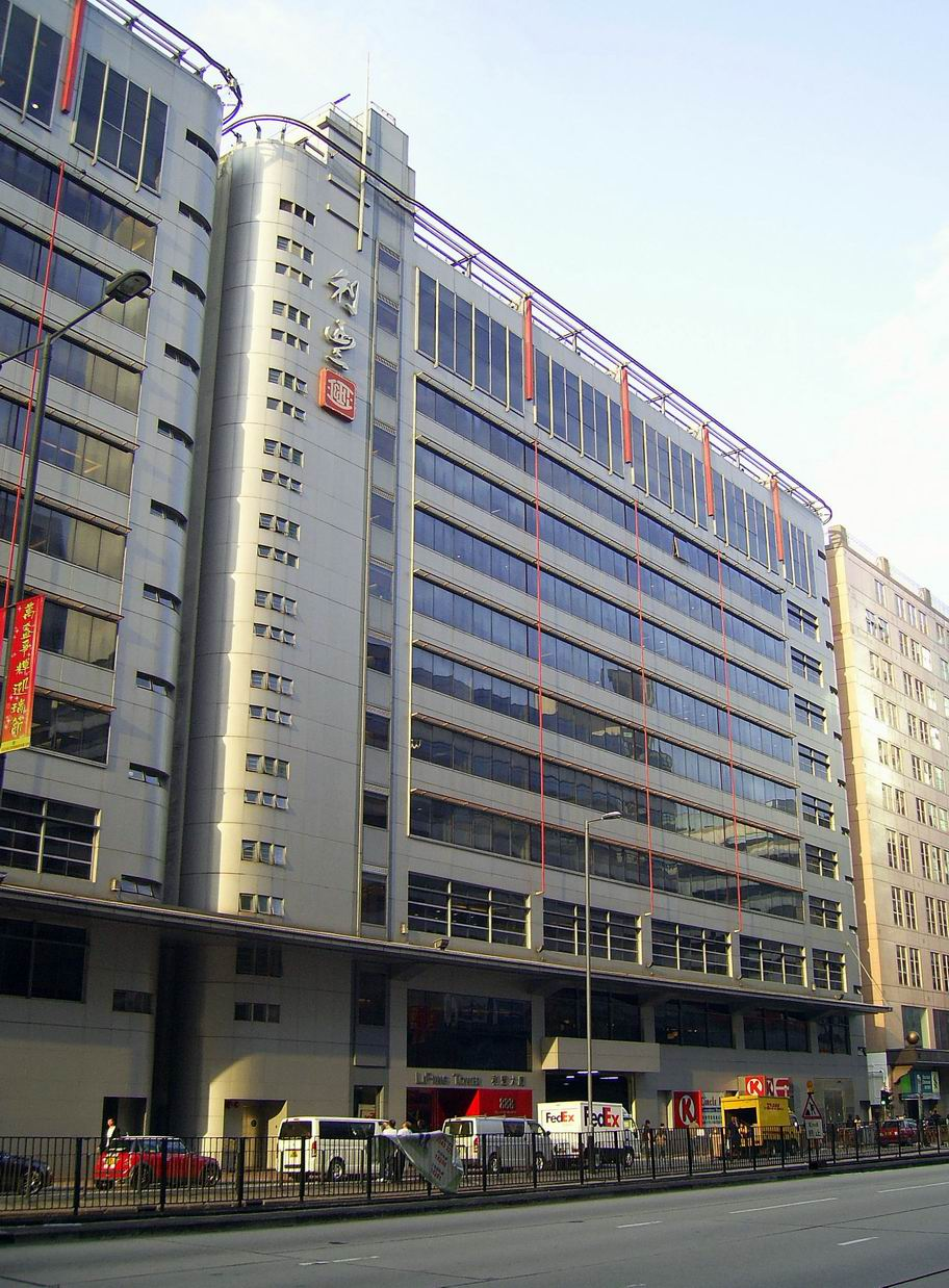 中文（香港）: 長沙灣利豐大廈